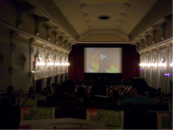 Kino Europa u Zagrebu.